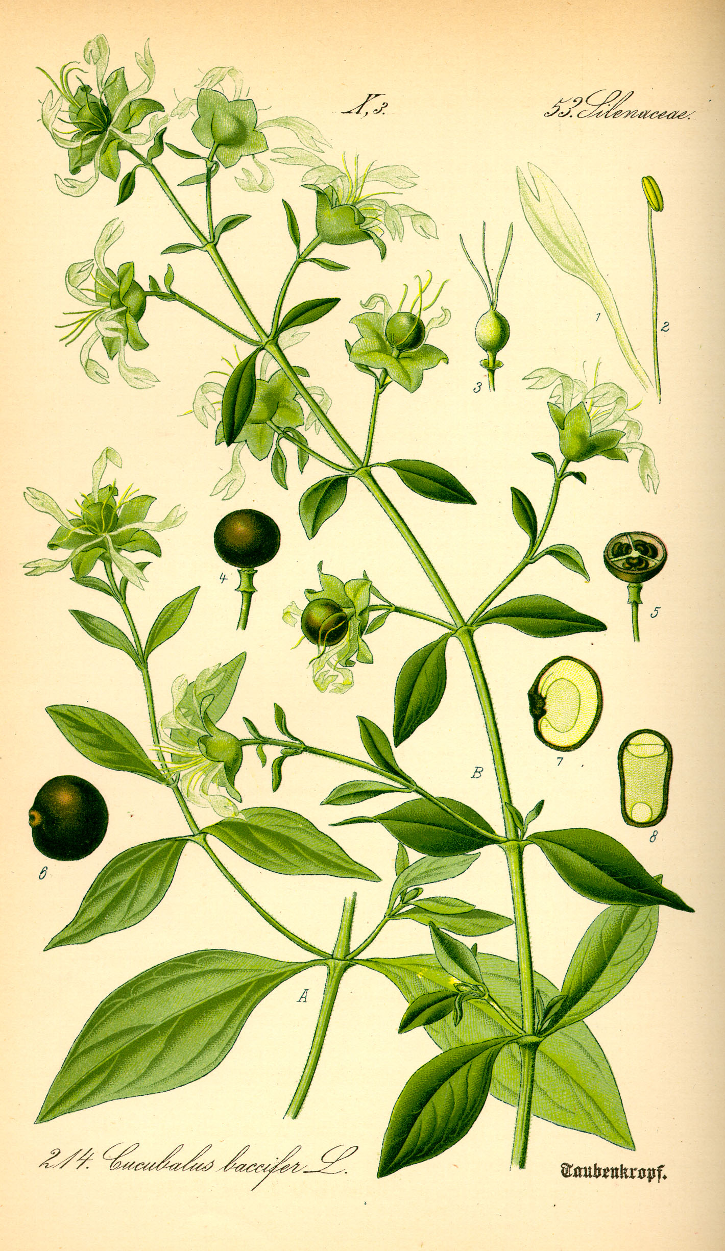 Coulichon, Cucubale à baies